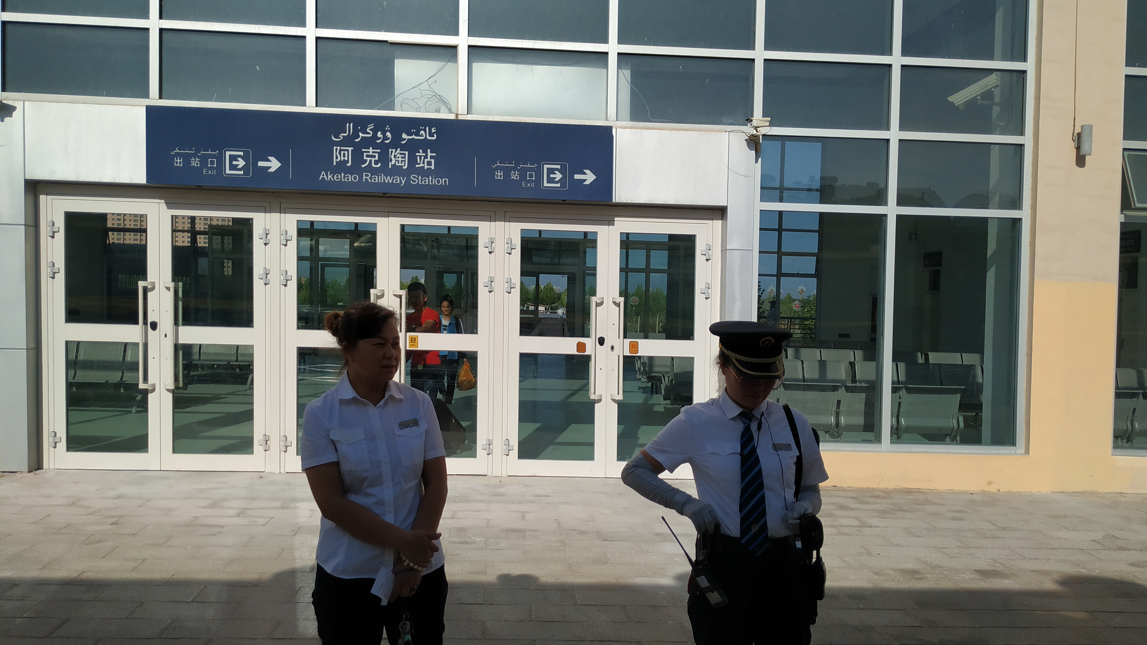 中文（中国大陆）: 阿克陶火车站